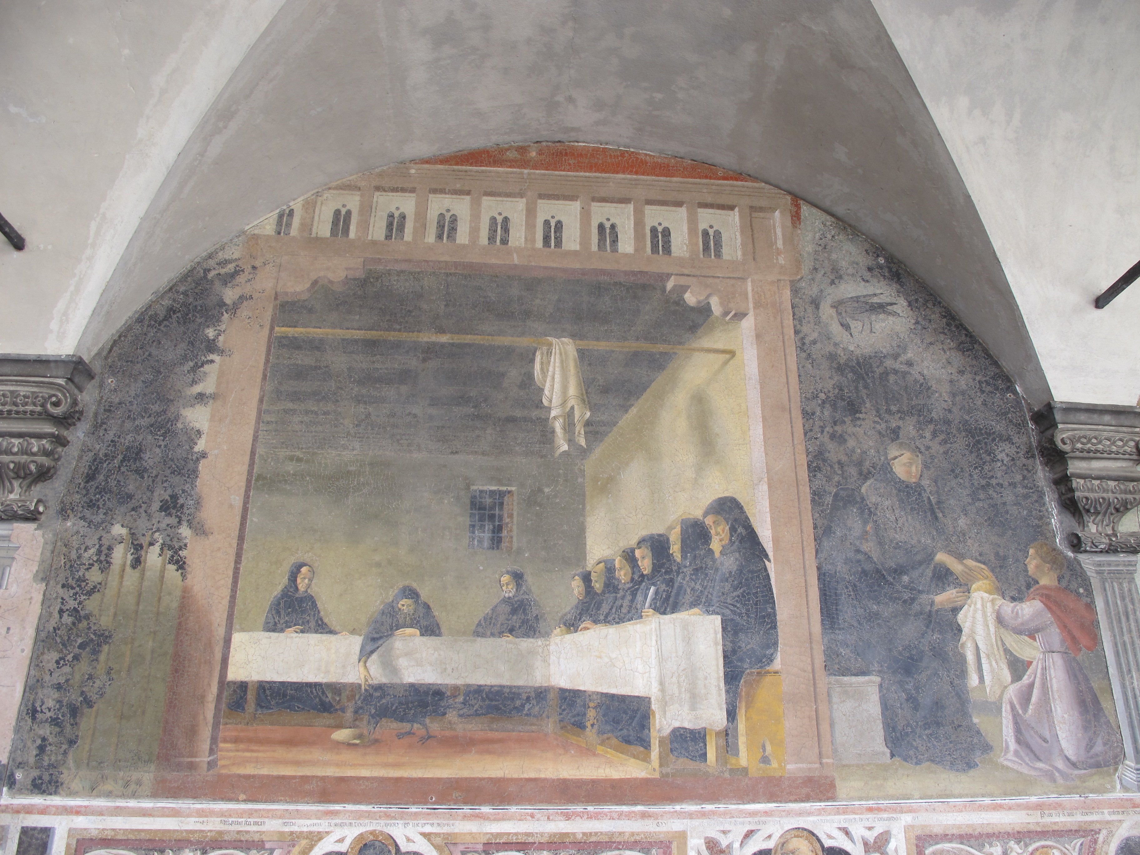 firenze, badia fiorentina